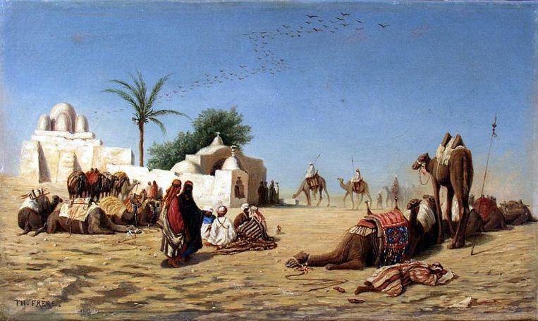 La halte de chameaux au caravansérailtitle QS:P1476,fr:"La halte de chameaux au caravansérail" label QS:Lfr,"La halte de chameaux au caravansérail"